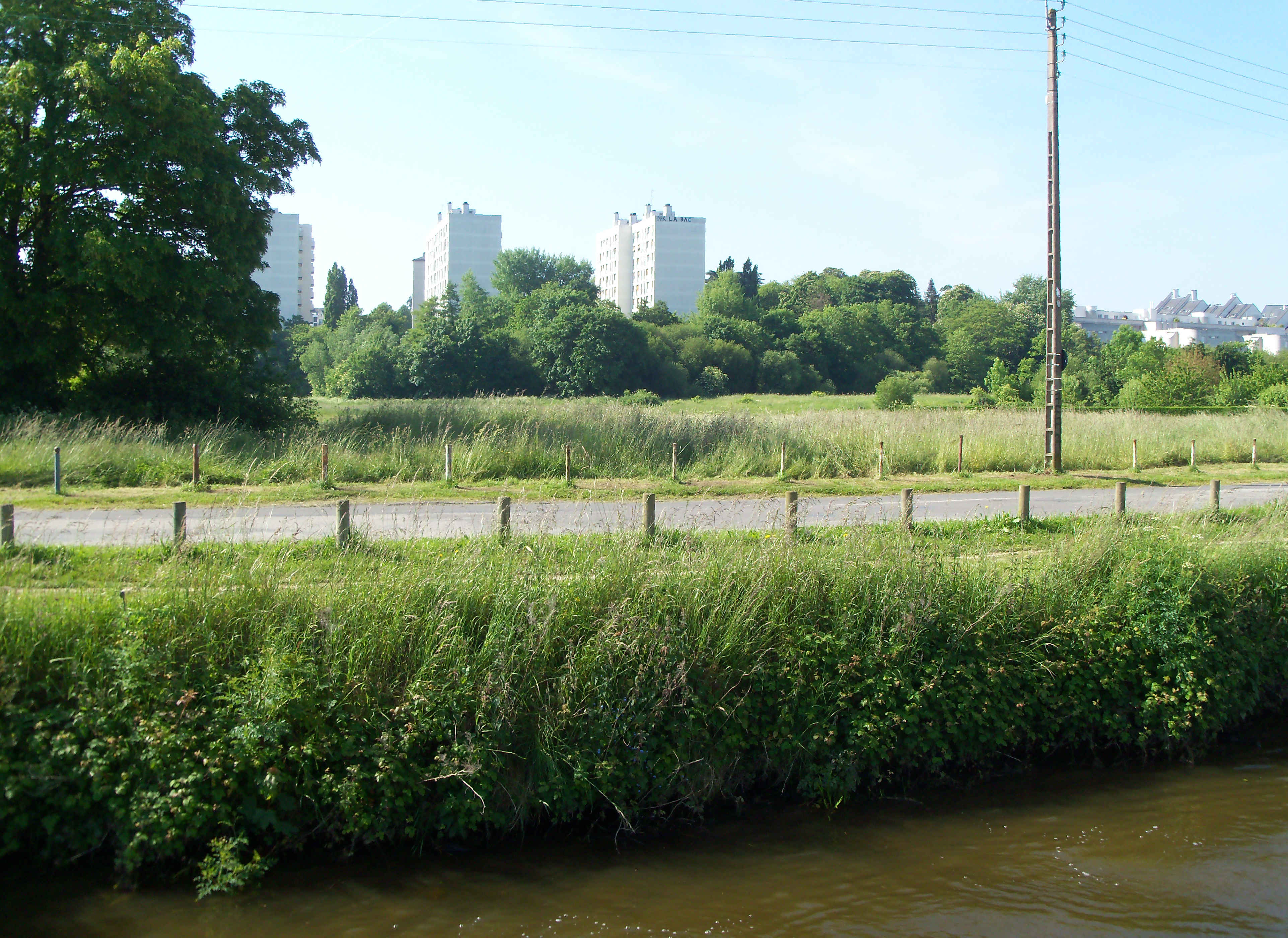 Les Prairies Saint-Martin à Rennes, partie visible depuis le canal d'Ille-et-Rance, mai 2014.